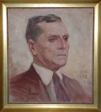 Albert Stolz: Porträt Paul Tschurtschenthaler. Öl auf Leinwand (1933), Stadtmuseum Bruneck